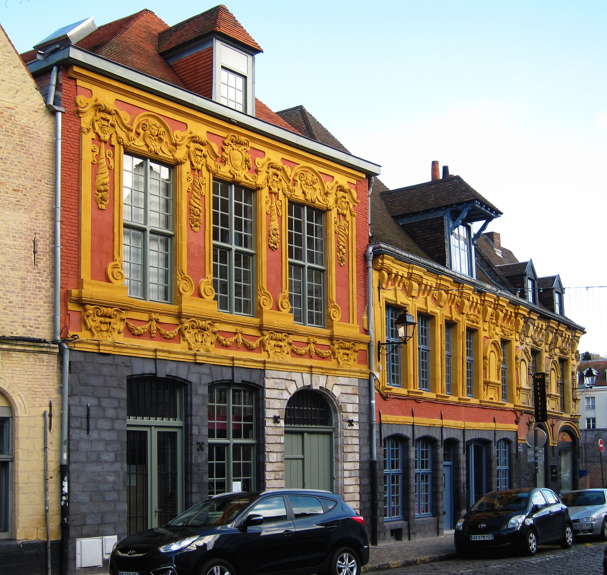 Maisons 25, 27 place Louise-de-Bettignies à Lille.